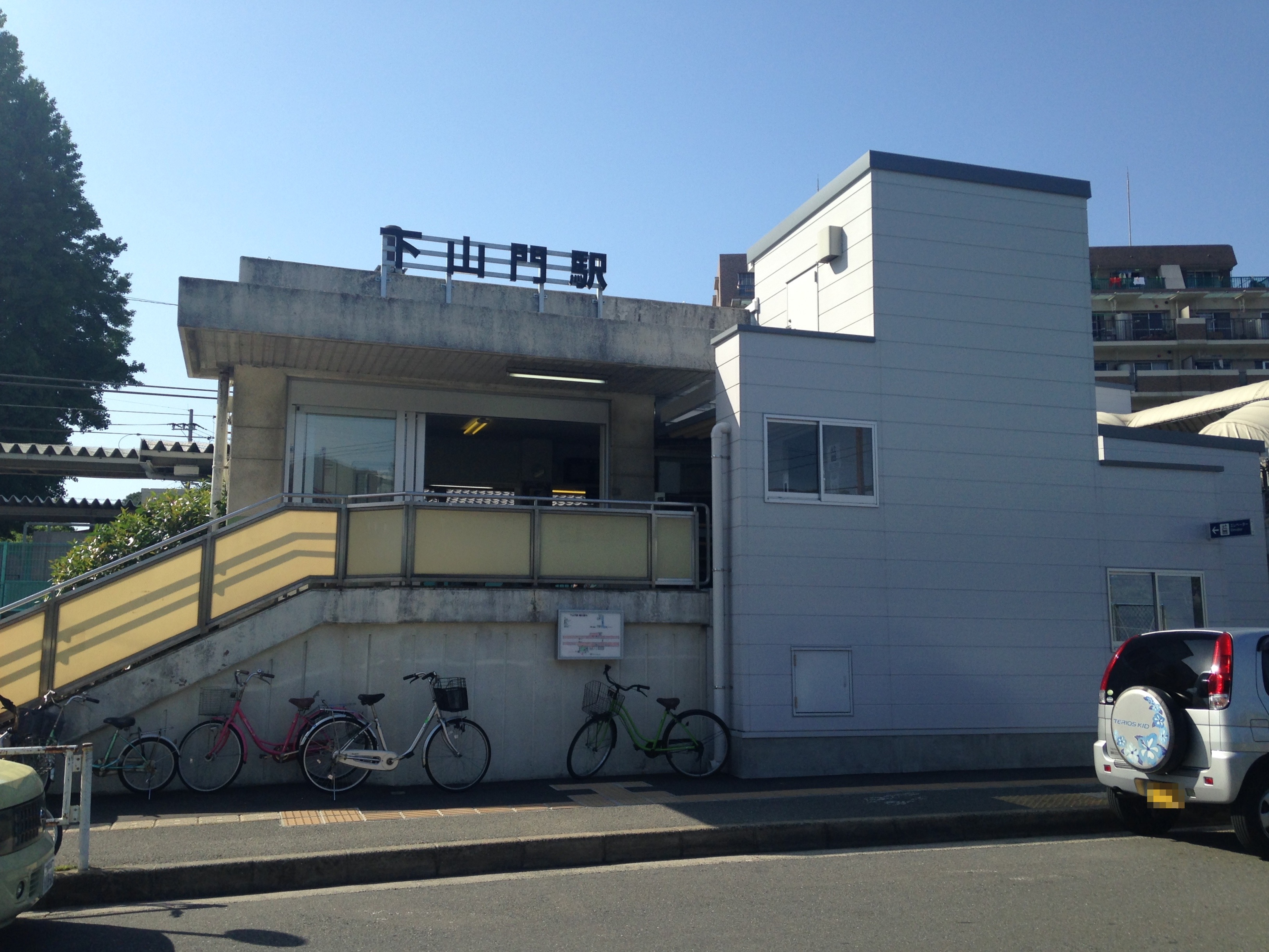 下山門駅駅舎